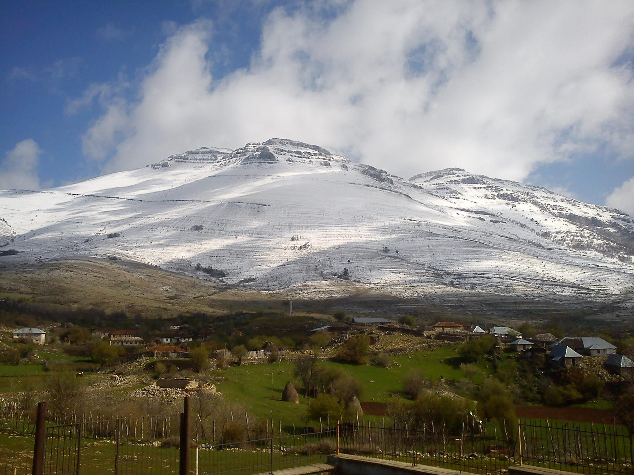 Pashtriku i fotografuar nga fshati Kishaj